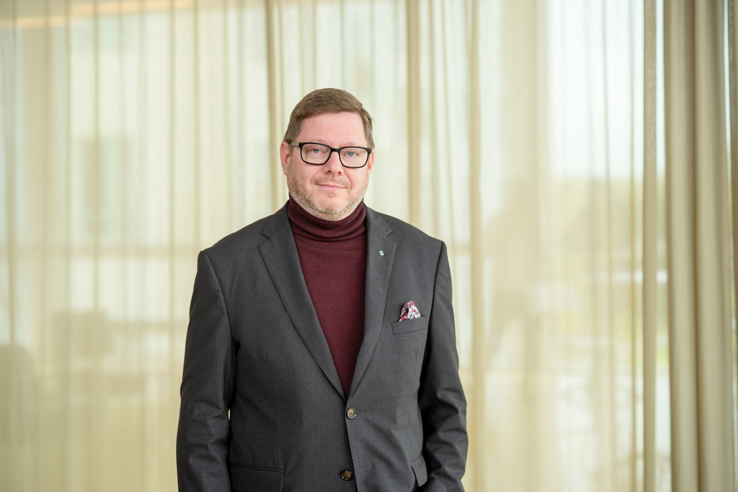 Per Lodenius, Centerpartiet